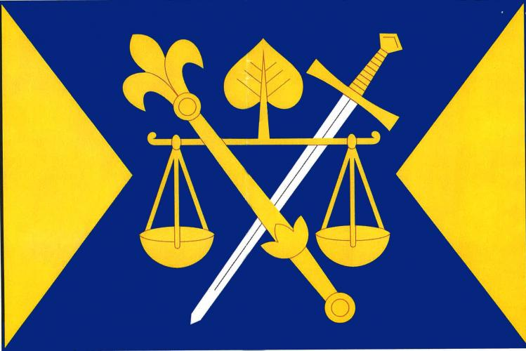 Komorovice vlajka